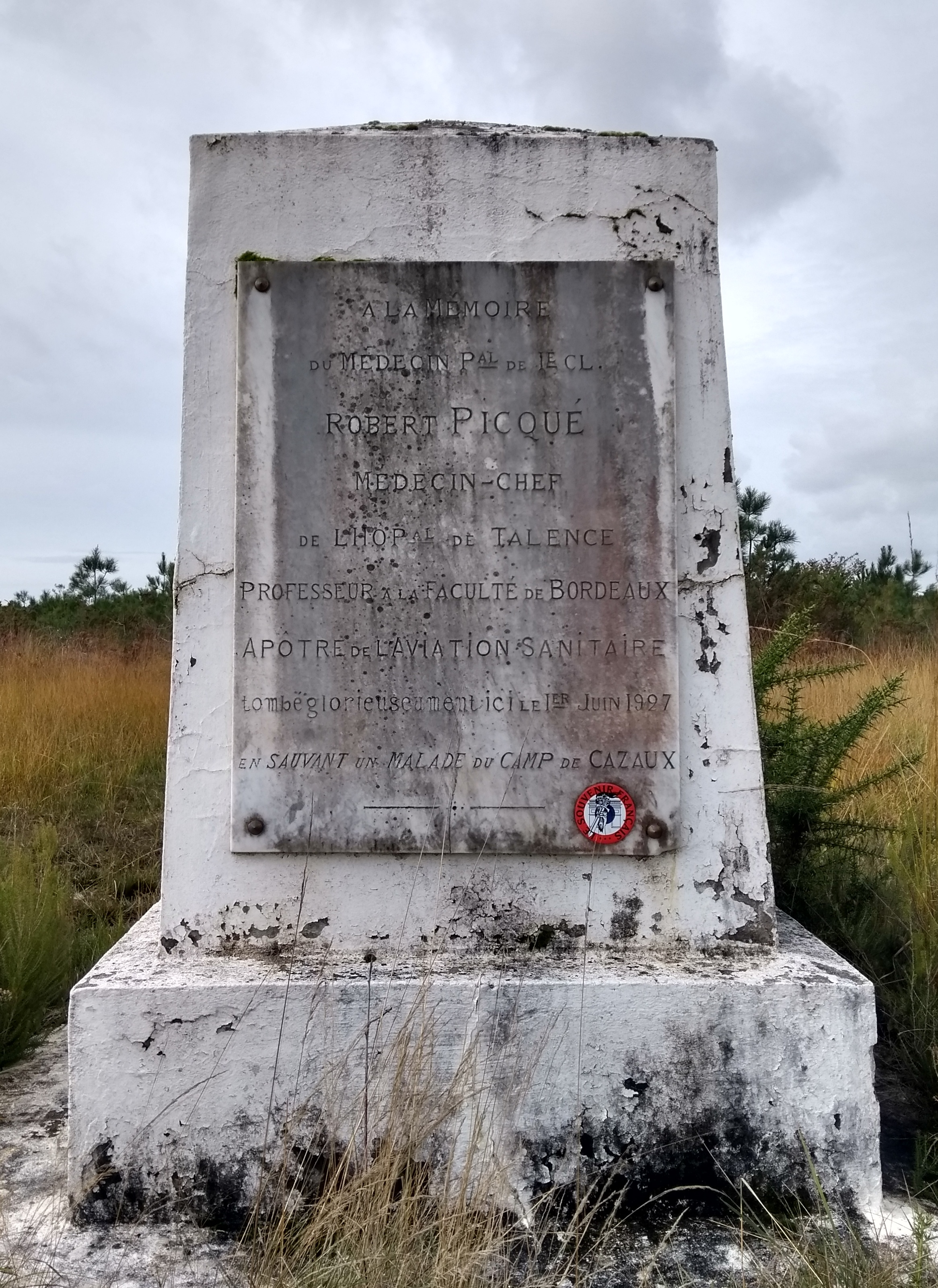 Stèle Robert Picqué, sur le lieu où il trouva la mort le 1er Juin 1927. Installée en 1937.